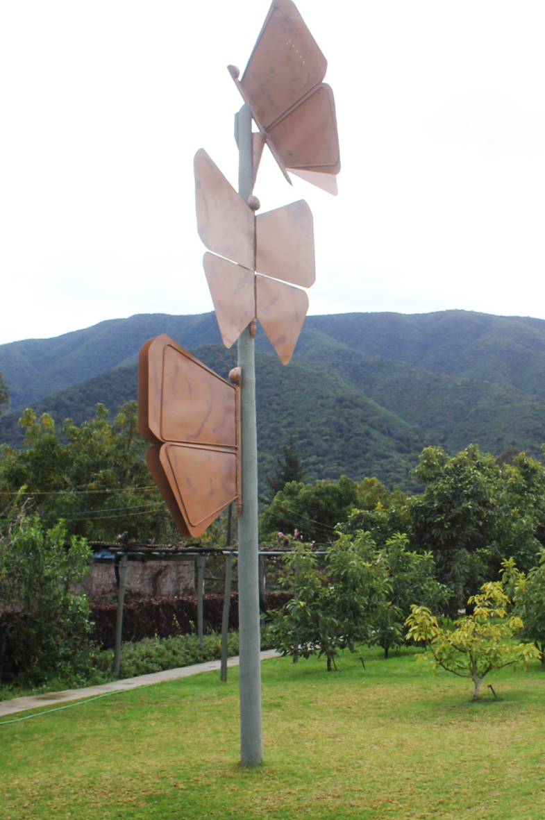 Escultura de Eugenio Cruz Vargas (1923 – 2014). Materialidad: fierro y planchas recicladas de cobre. Medidas: 600 x 100 cm. Autor de la fotografía: José Cruz, quien en calidad de autor y propietario titular de la misma otorgó el consentimiento para publicar y difundir en la red internet esta imagen bajo las condiciones que establece la Licencia de Uso CreativeCommons, Atribución-Compartigual 3.0 Unported (CC BY-SA 3.0).